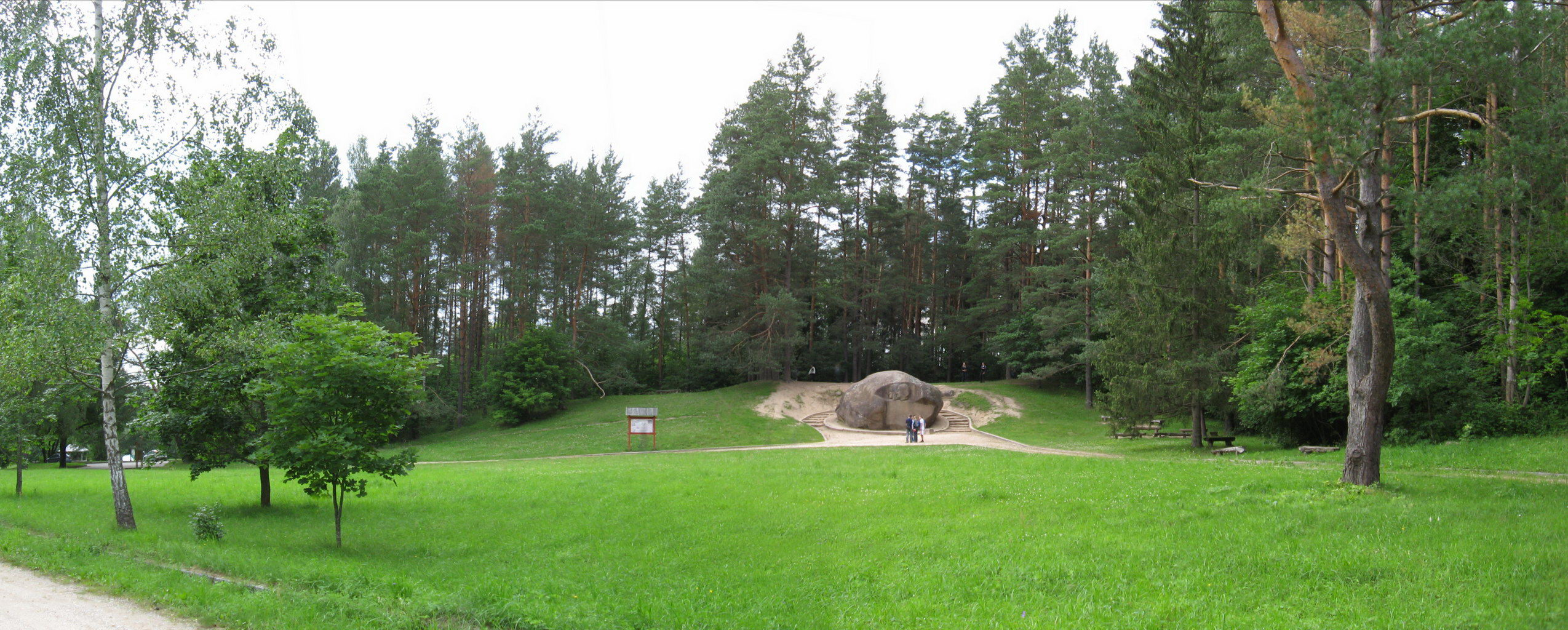 Puntukas. Riedulys Anykščių šilelyje